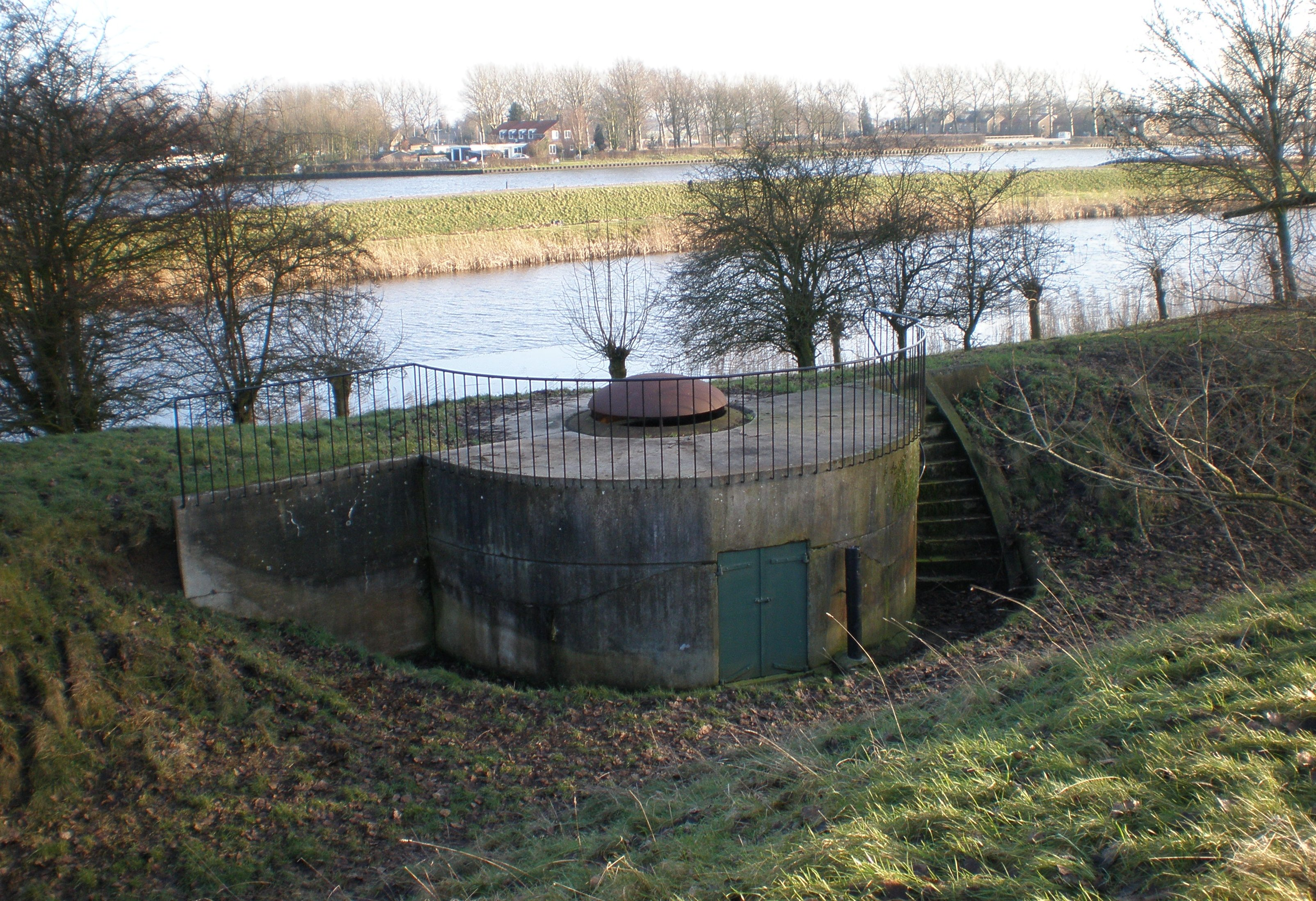 Stelling van Amsterdam: Fort bij Nigtevecht, Amsterdam-Rjinkanaal